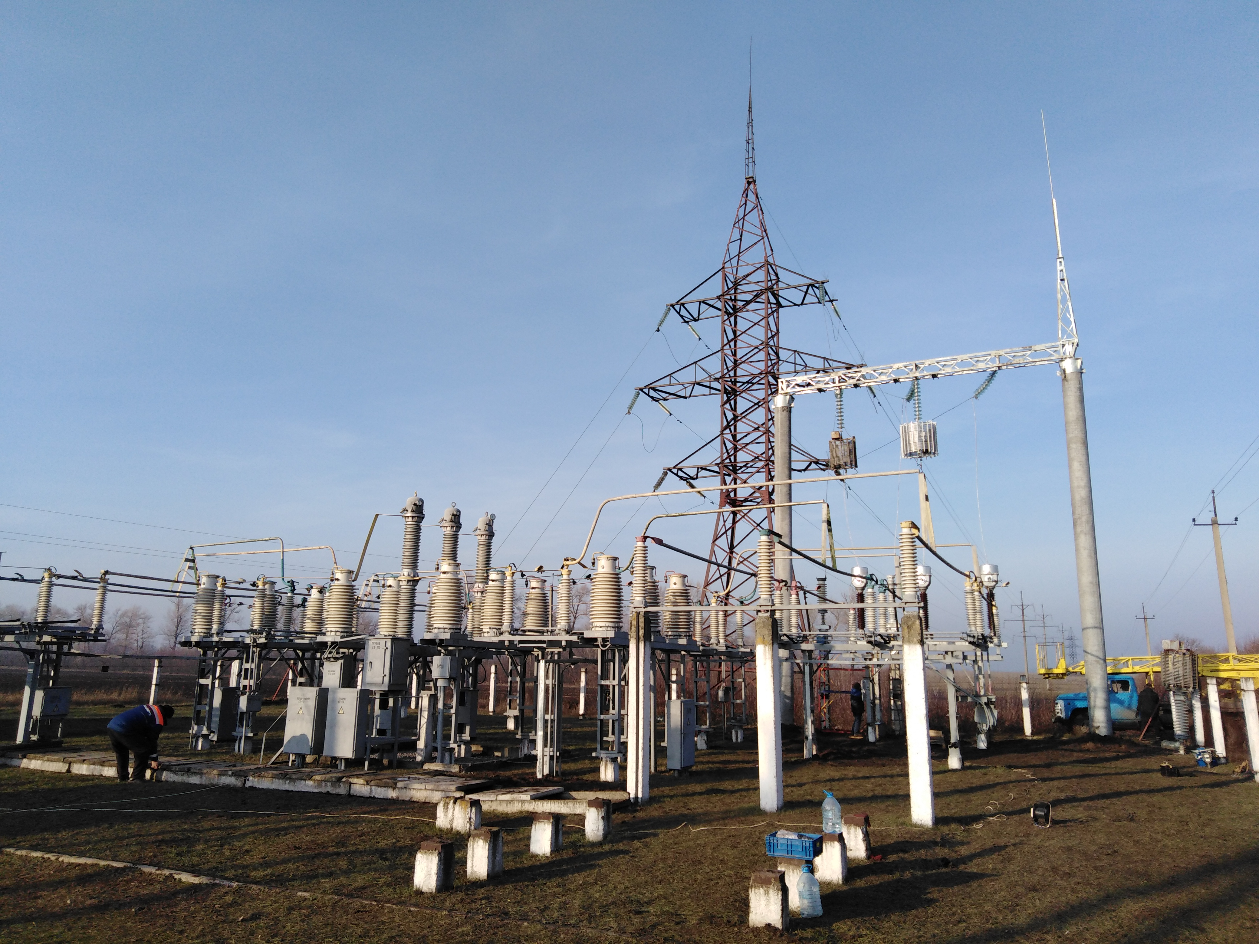 Україна. Полтавська область. Підстанція "Полтаваобленерго" ПС 110/10 кВ "Клепачі". ВРУ-110 кВ.